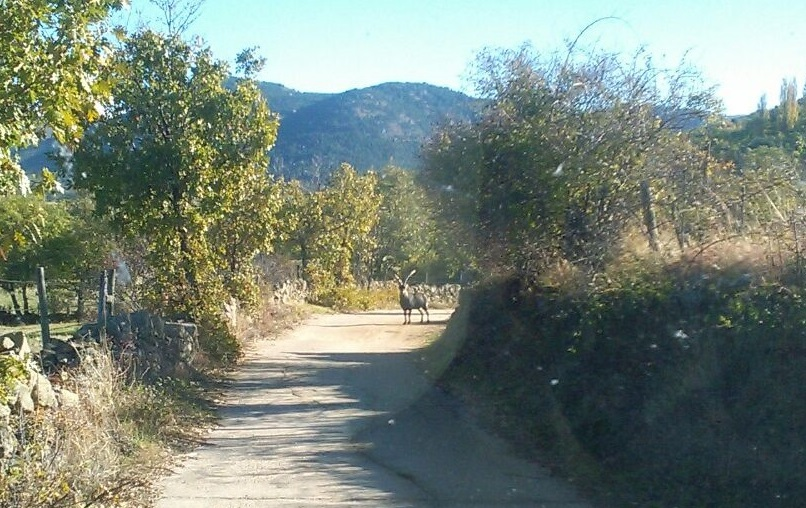 Cabra montés en el camino entre Villafranca de la Sierra y San Miguel de Corneja, ambos municipios de la provincia de Ávila